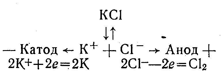 Отримання кальцію електполізом.